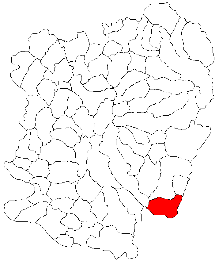 Categorie:Hărţi ale judeţului Caraş-Severin